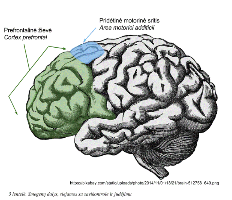 Prefrontalinė žievė ir pridėtinė motorinė sritis